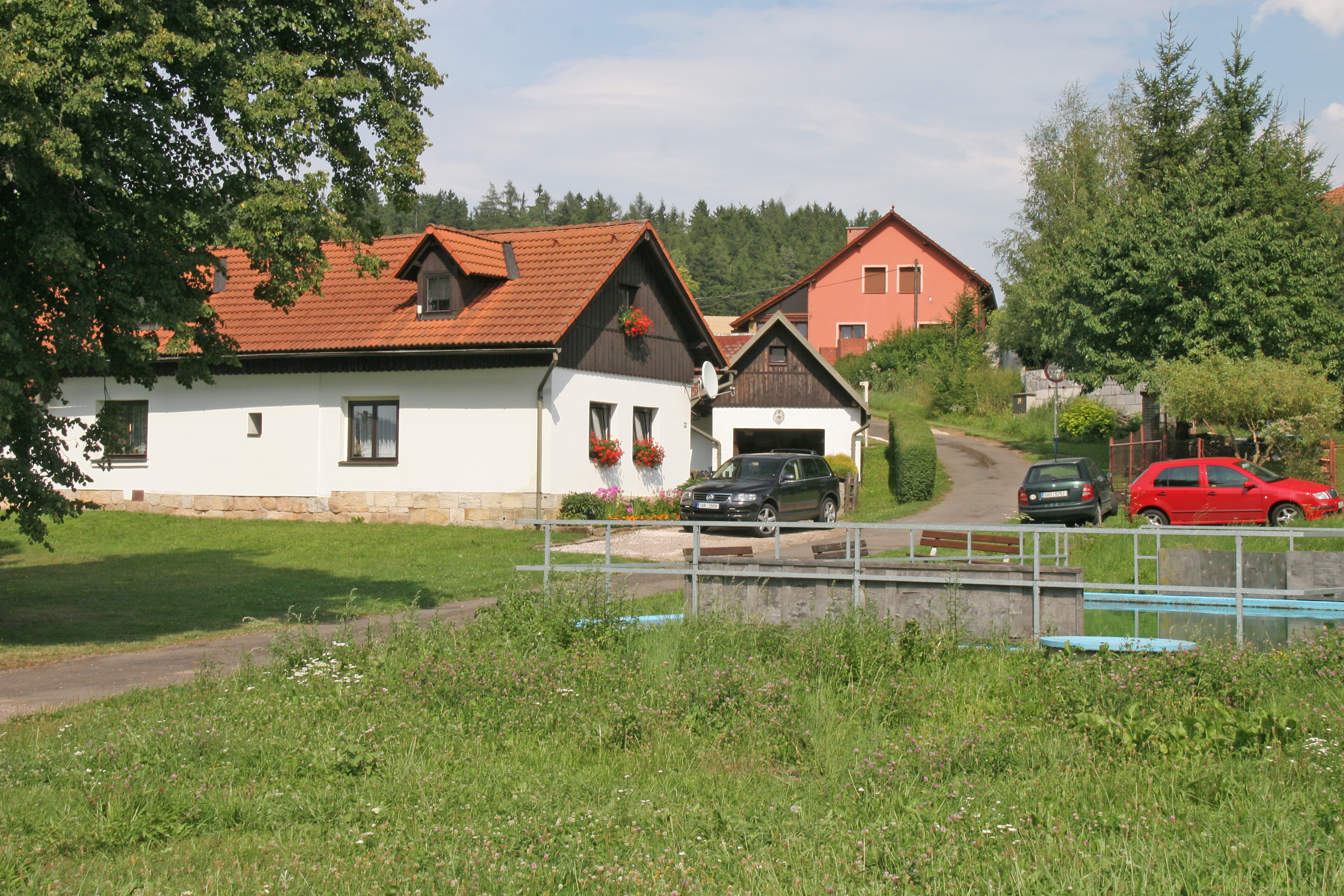 Horní Dehtov čp. 32